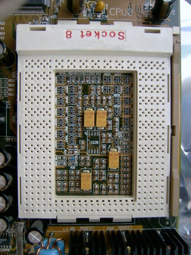 Summary Bildbeschreibung: Foto eines Socket 8-Prozessorsockels Quelle: selbst fotografiert Fotograf: Quark48 Datum: 5. Februar 2006 Sonstiges